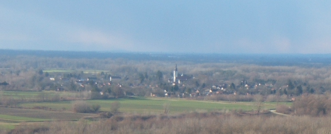 Légrád látképe Őrtilos irányából